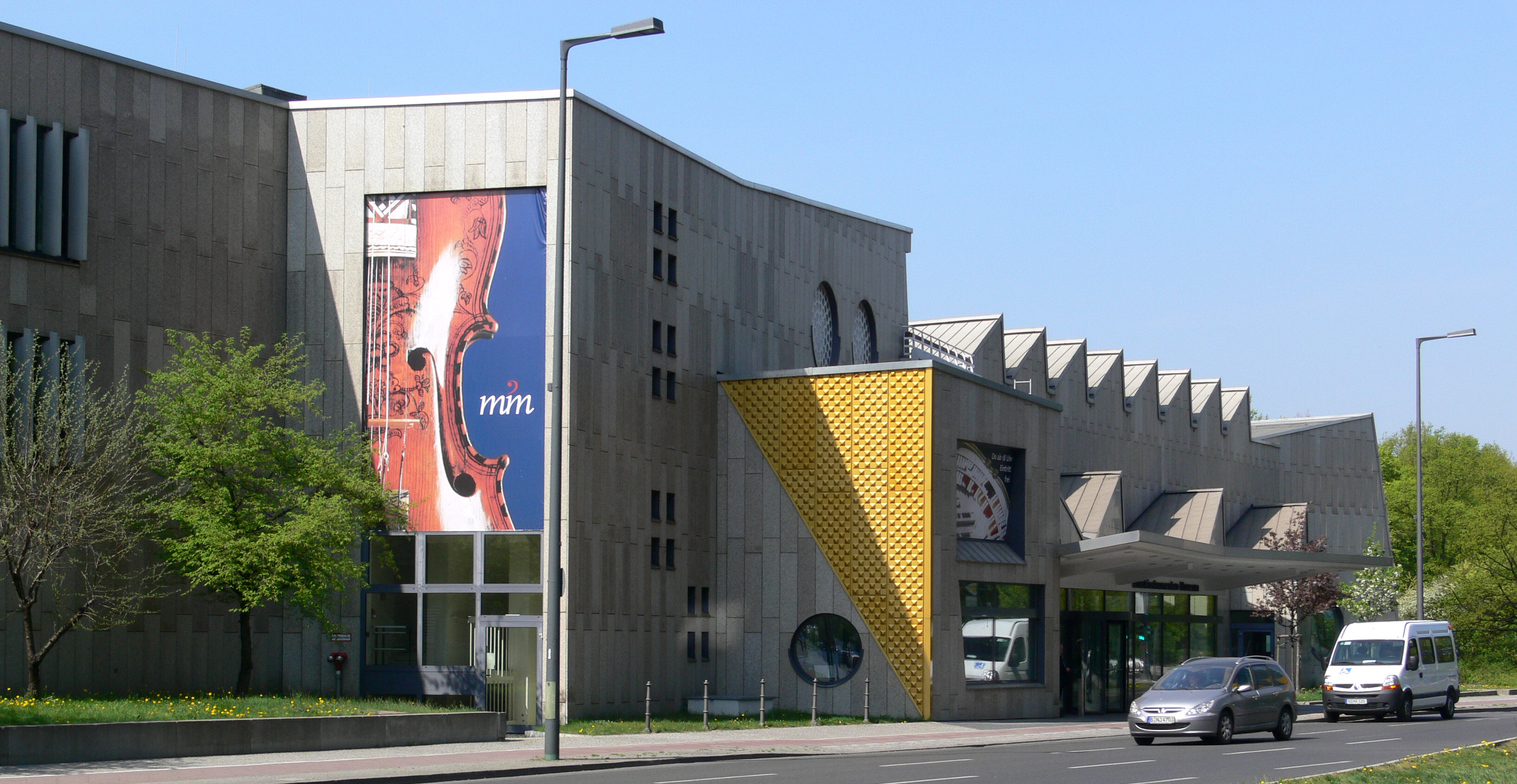 Berlin-Tiergarten, Musikinstrumentenmuseum